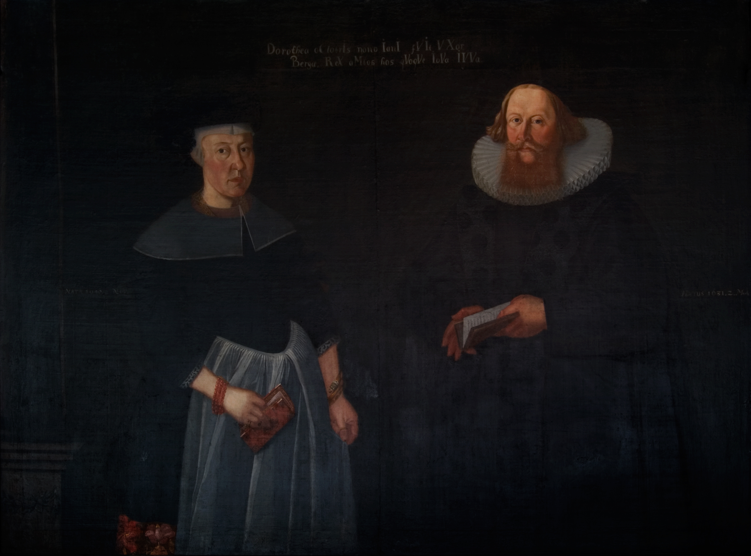 Jens Samuelsen Bugge og Christine Dorothea Skjelderup måla av Elias Fiigenschoug i 1661.